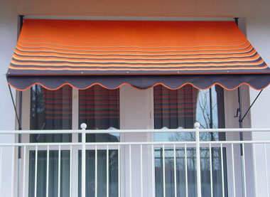 Angerer Klemmmarkise